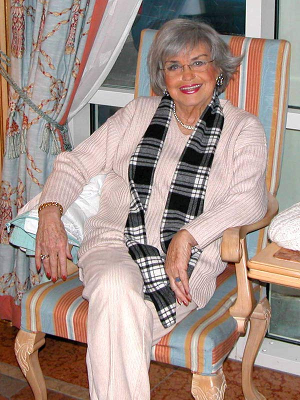 Ruth Megary vor Casting-Termin